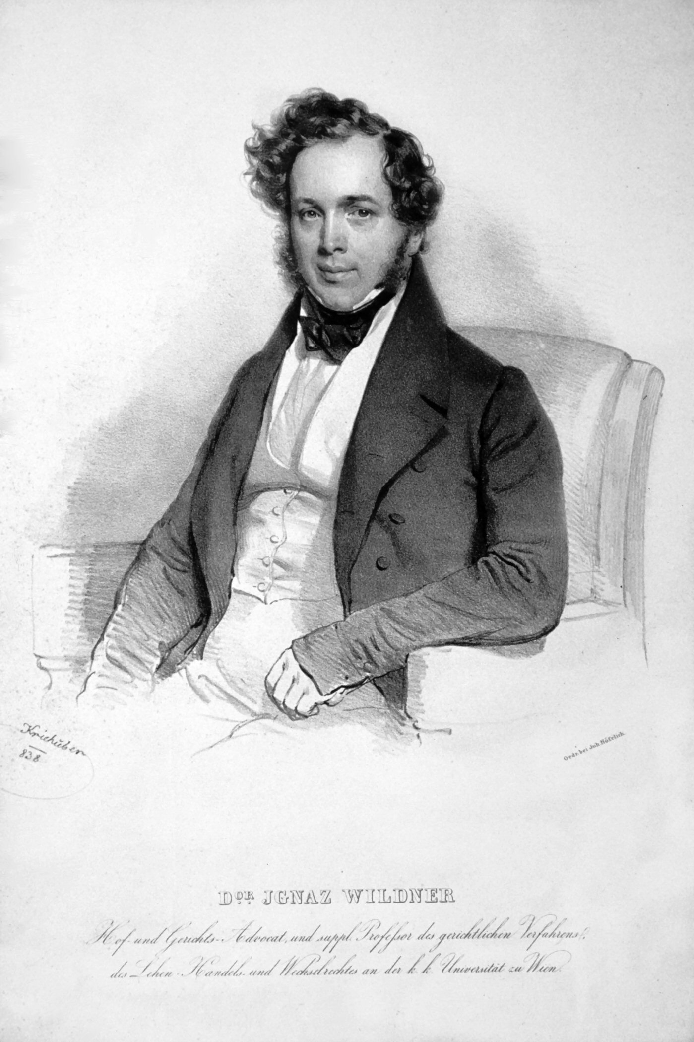 Ignaz Wildner, Edler von Maithstein (1802-1854), Jurist, Abgeordneter Lithographie von Josef Kriehuber, 1838